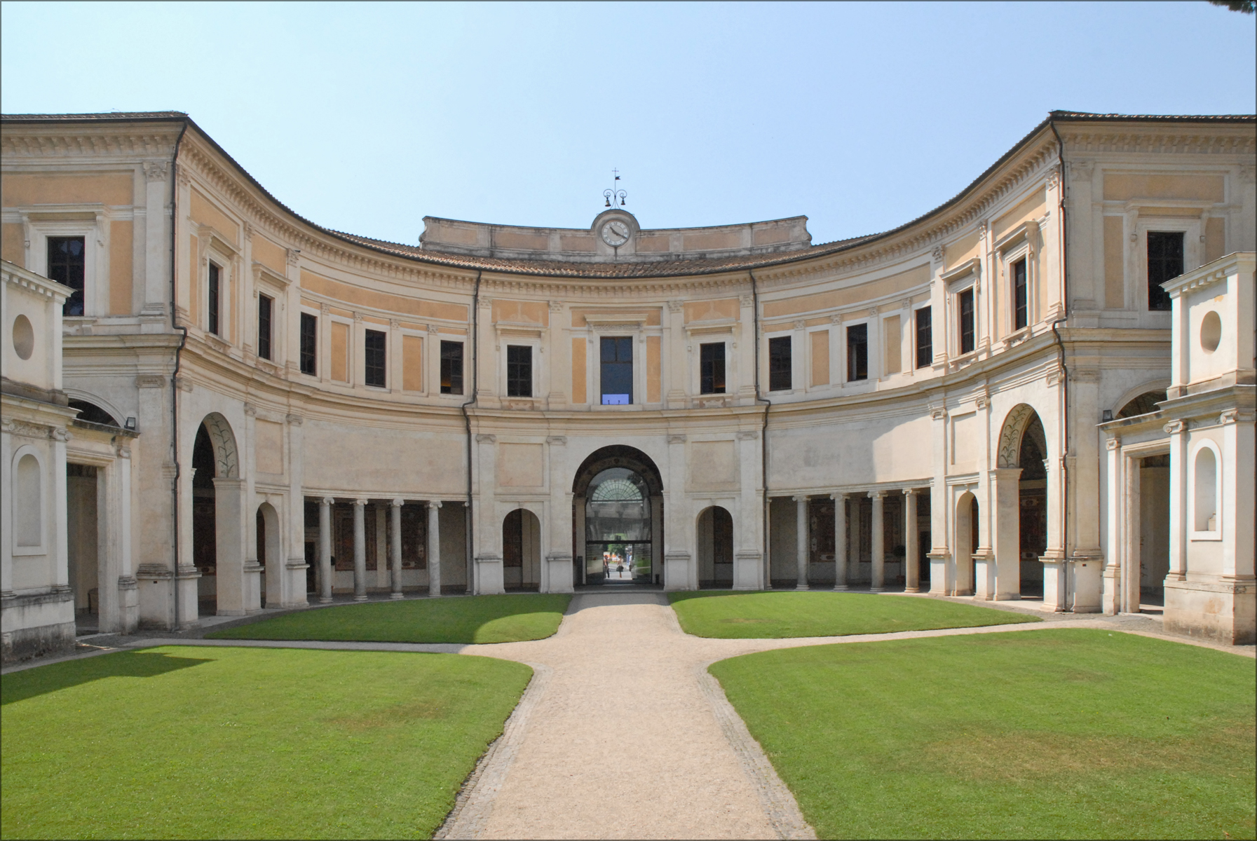 La cour de la villa Giulia et le bâtiment d'entrée avec le portique en hémicycle La Villa Giulia a été édifiée dès 1551 à la demande du Pape Jules III (1550-1555) qui a fait appel à trois architectes éminents : Vasari, Vignole et Ammannati. La villa est dotée d'une première cour intérieure avec un portique en hémicycle dont la voute est décorée à fresque. Les peintures murales imitent une tonnelle garnie de sarments de vigne, de rosiers et de jasmin. En 1552, Bartolomeo Ammannati a réalisé un deuxième espace doté d'une loggia avec un escalier en fer à cheval, d'un nymphée avec rocailles, fausses grottes et cariatides, le tout décoré de sculptures romaines. Les deux allégories fluviales représentent l'Arno et le Tibre. Au 20ème siècle pour développer le musée national étrusque, créé initialement en 1889, deux ailes ont été ajoutées à la villa. Le temple étrusque d'Alatri a été reconstitué dans le jardin de droite. Les photographies n'étant pas permises à l'intérieur du musée (on ne comprend pas pourquoi car il n'y a aucun problème de droit d'auteur et de risque de dégradations), on se contentera d'images du jardin et du bâti.